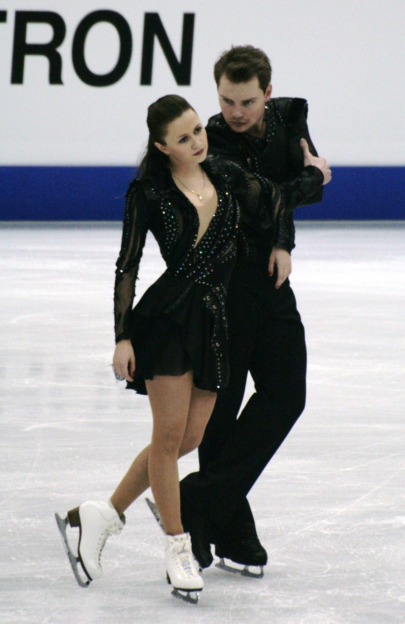 Юлия Злобина и Алексей Ситников (Азербайджан) на чемпионате мира по фигурному катанию 2012